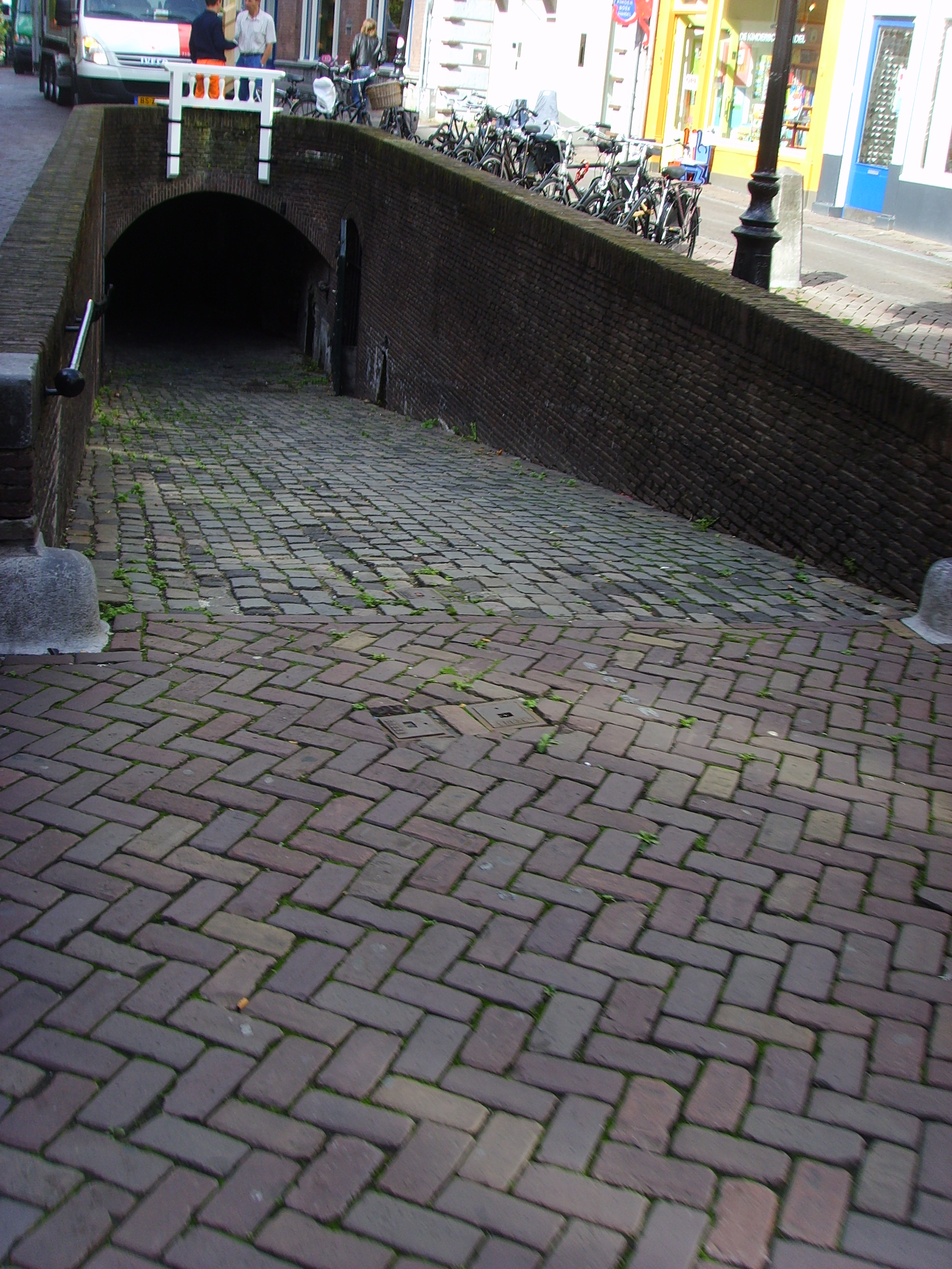 Ingang aan de Ganzenmarkt naar de werf van de Oudegracht in Utrecht